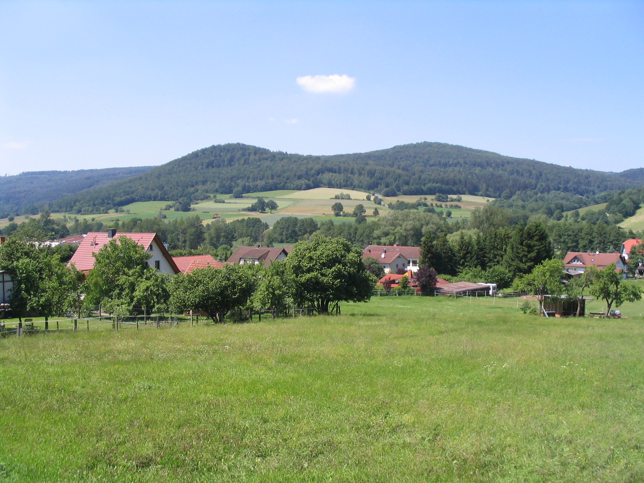 Blick von Oberzell in der Gemeine Sinntal nordwestwärts zum Kleinen (488 m) und Großen Nickus (558 m)